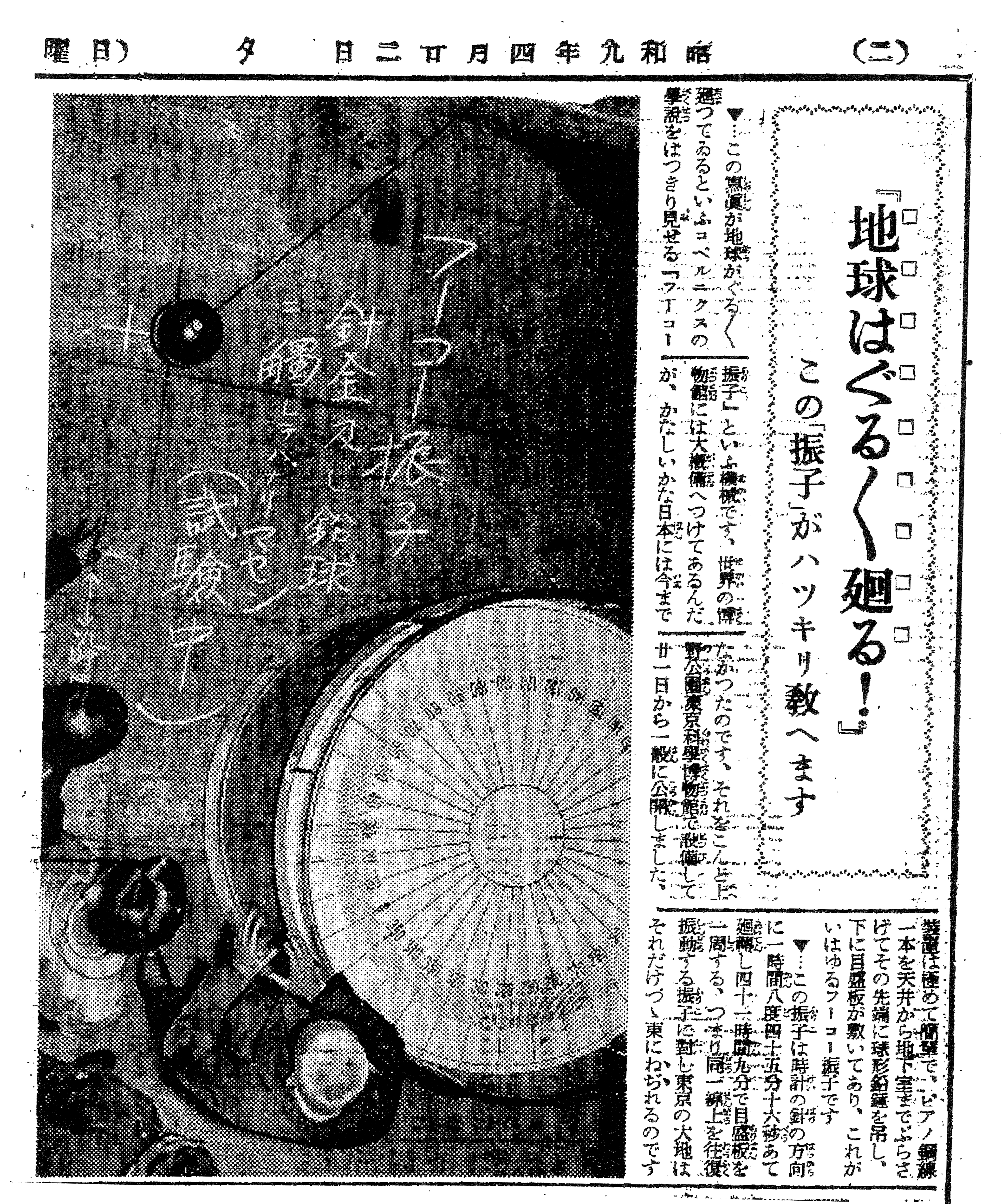 東京科学博物館（現：国立科学博物館）でフーコー振り子の展示を報じる記事